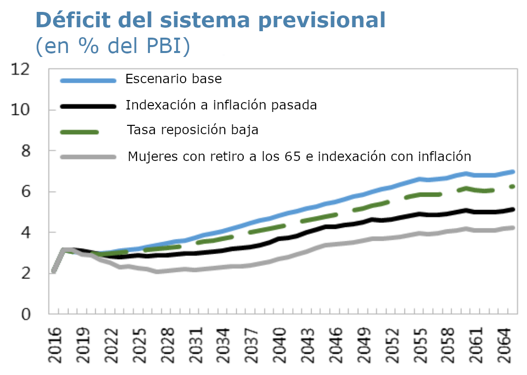 Estimación del déficit del sistema previsional argentino entre 2015 y 2066 medido en porcentaje del PBI. El inicio del gráfico en 2015 corresponde al déficit realizado del 2.8% del PBI. Cada línea muestra el tamaño del déficit estimado de aplicarse cada una de las medidas. Cada medida se aplica de manera progresiva durante un período de 10 años. Fuente: Argentina's Pension and Social Security System: A sustainability analysis en IMF Country Report No 16/347, November 2016, pagina 60 (